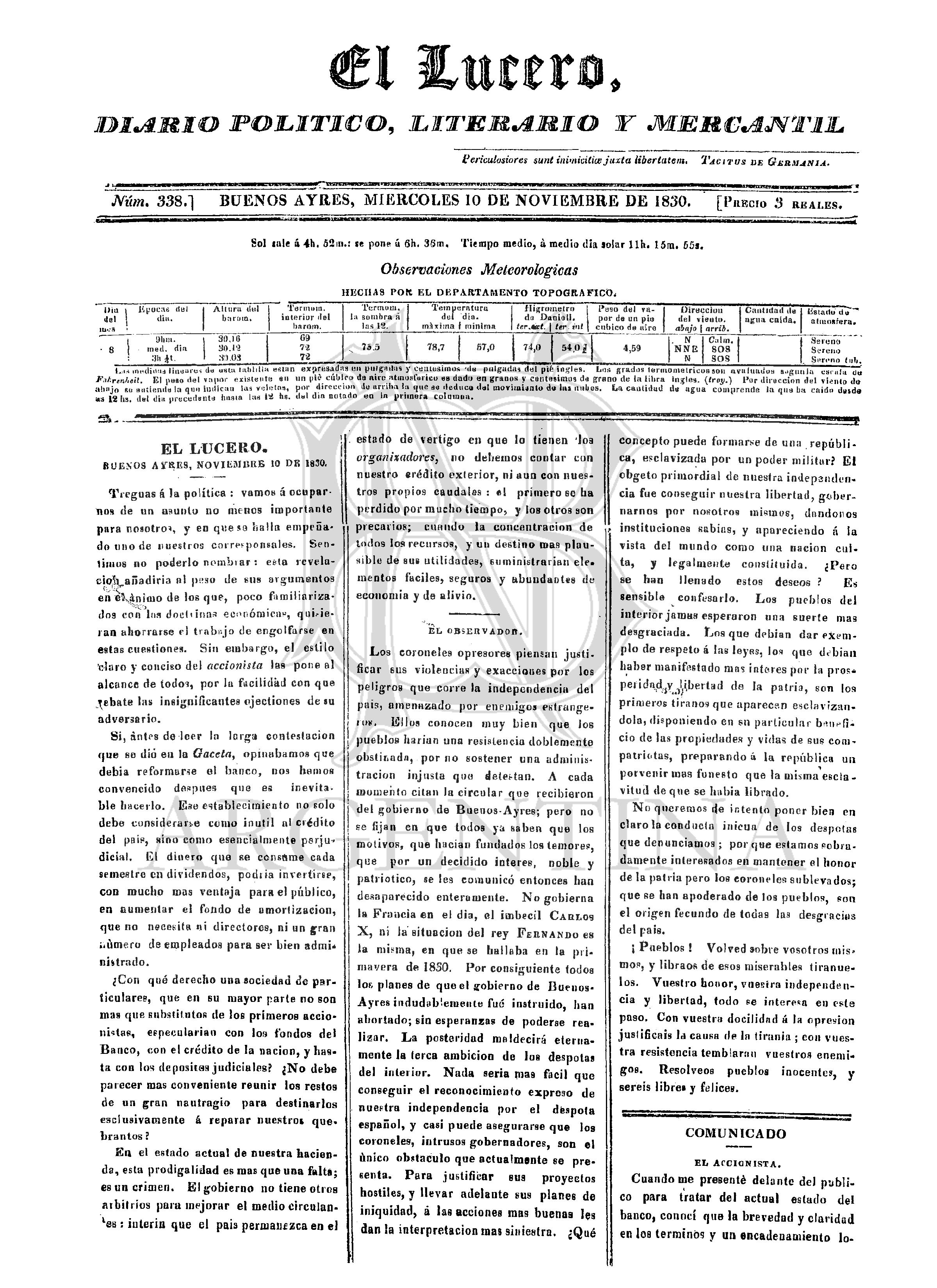 cover de El Lucero. Diario político, literario y mercantil